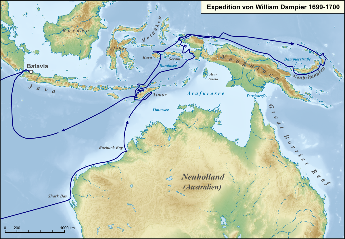 Karte der Route der Expedition von William Dampier entlang der West-/Nordwestküste Australiens, sowie der Küsten Timors, Neuguineas und Neubritanniens 1699